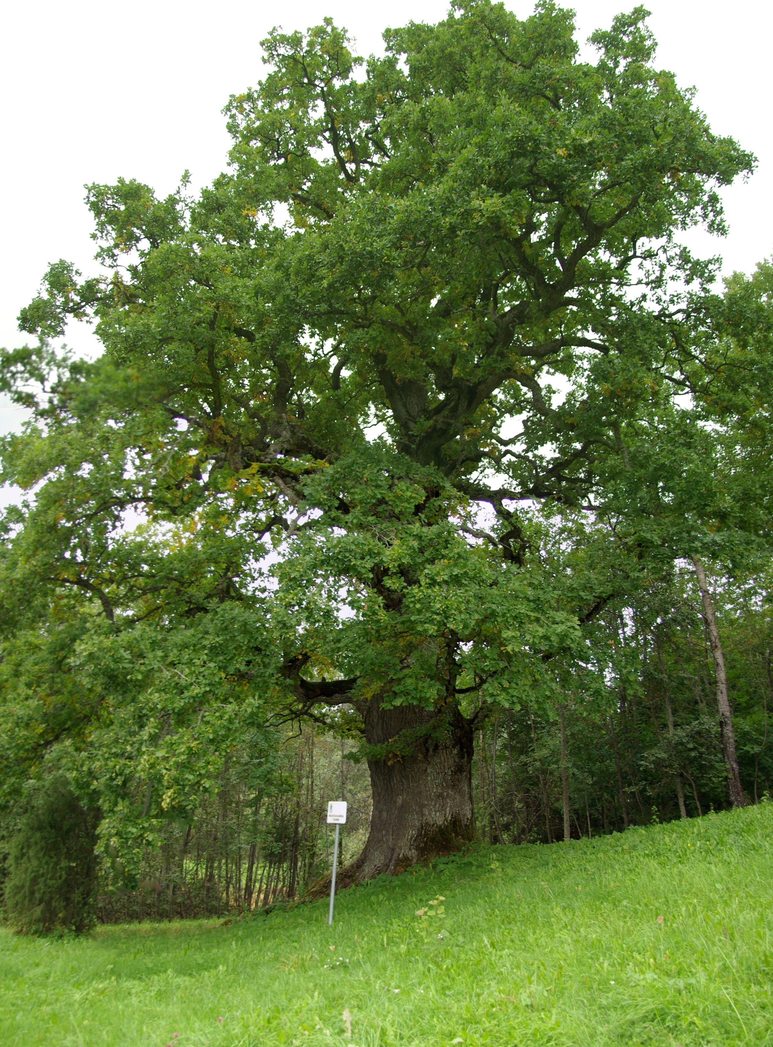 Mustahamba tamm kasvab Haanja vallas Raagi külas Suuretamme talu lähedal.